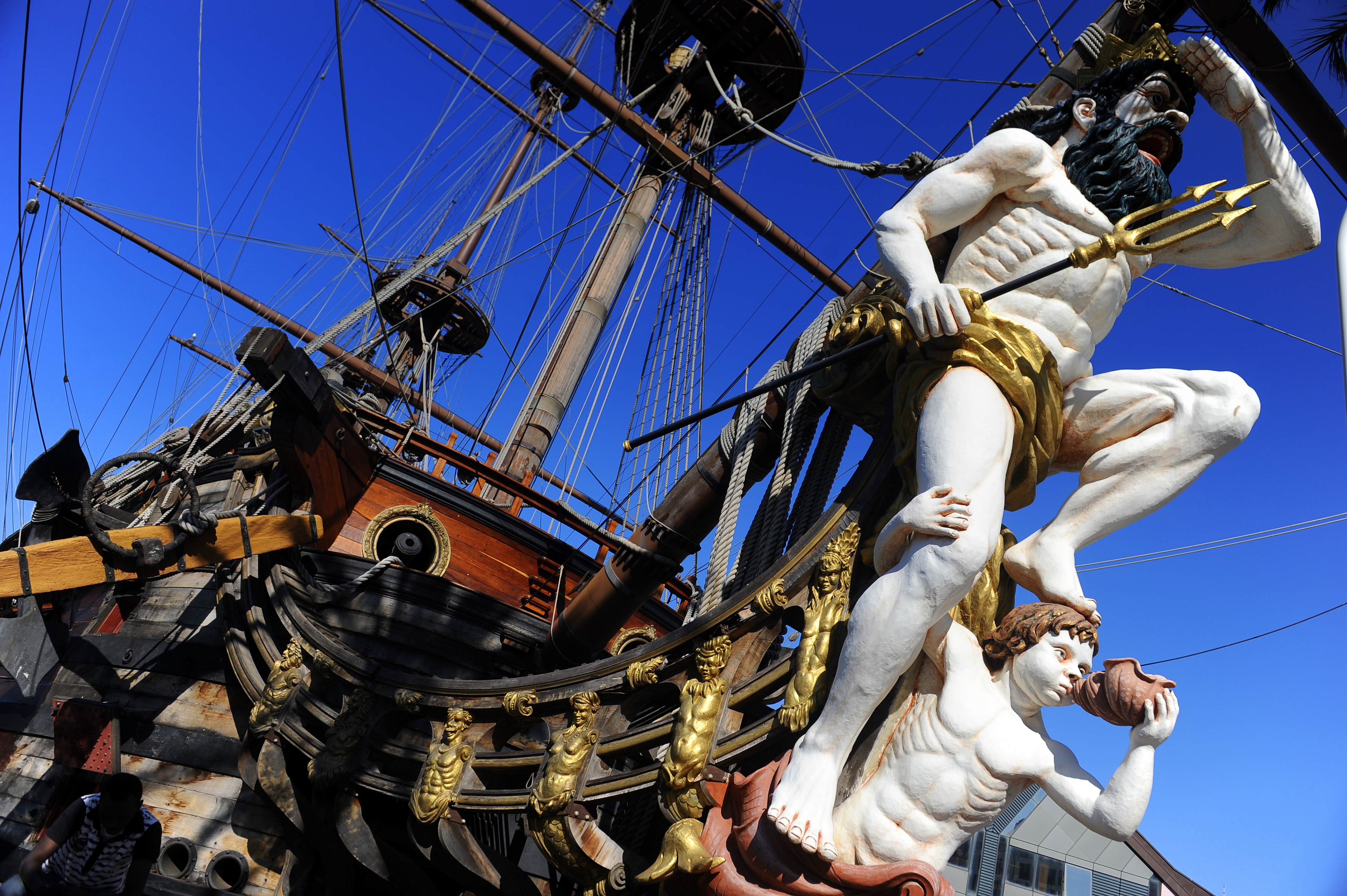 Galeon Neptun - replika galeonu wykorzystana w filmie "Piraci" Romana Polańskiego